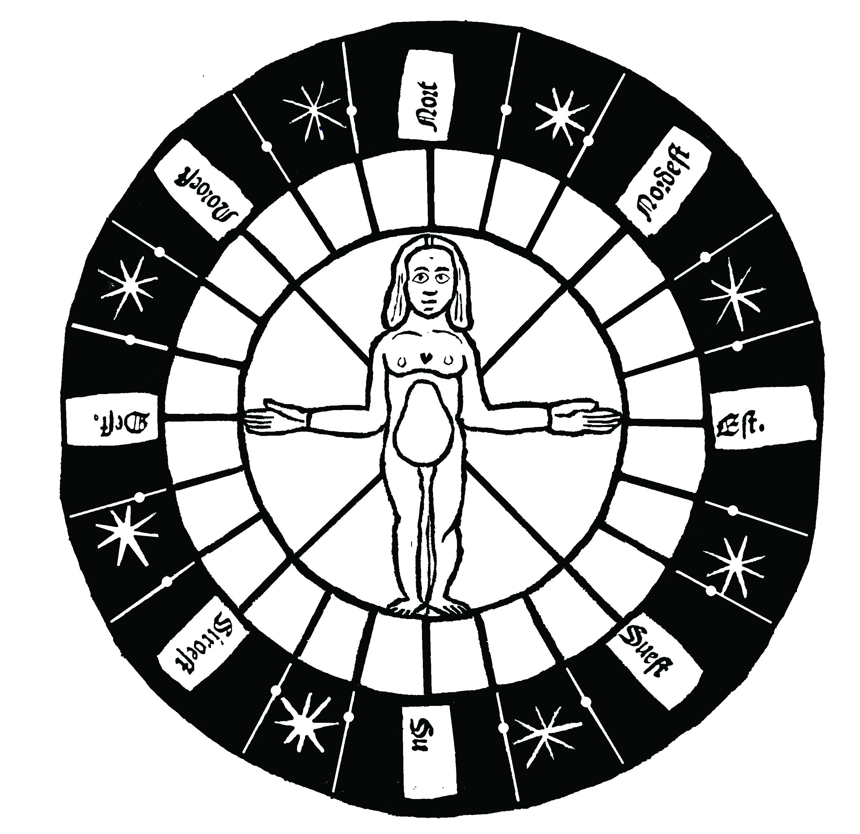 instrument de navigation du XVe siècle